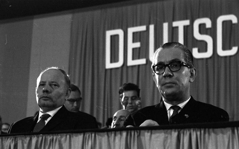 CDU Kundgebung in den Kölner Messehallen